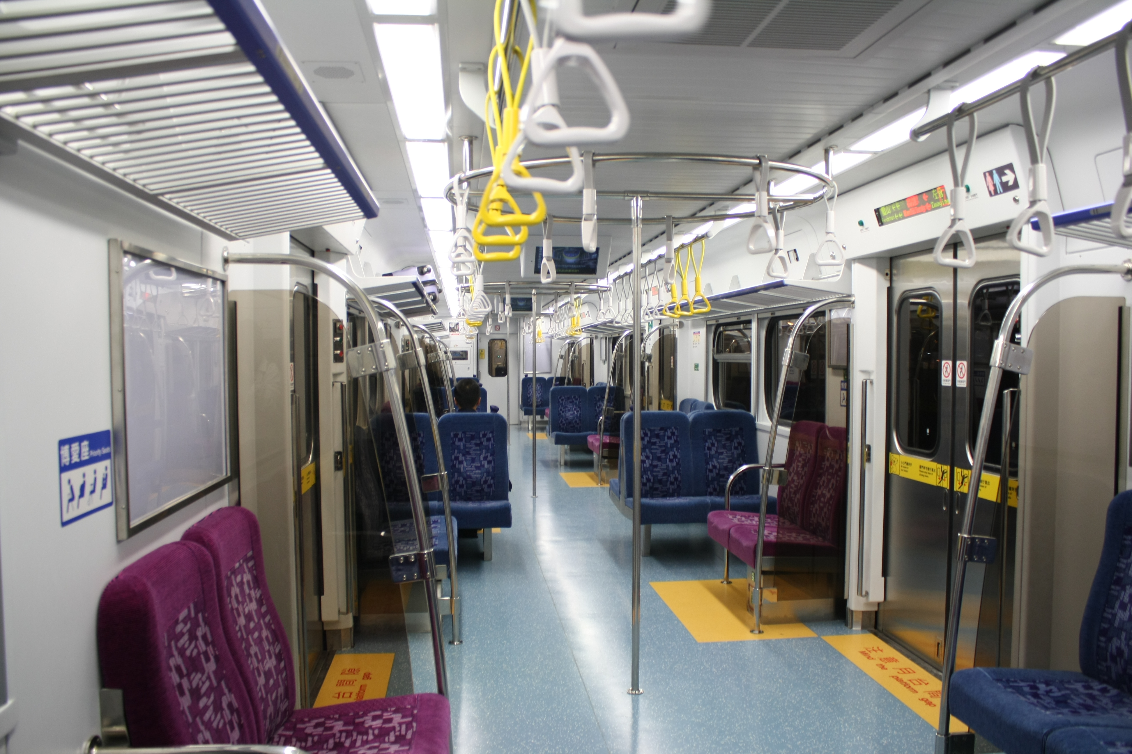 台鐵EMU800型電聯車EM車車廂內部，攝於下行3213次(嘉義至屏東區間列車，楠梓至新左營區間。